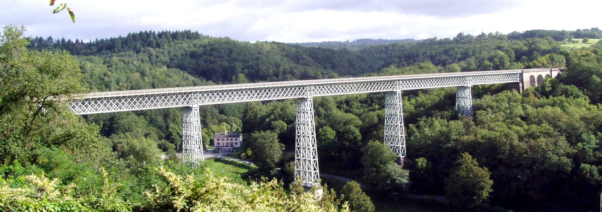 Catégorie:Viaduc du Massif Central Viaduc de Busseau sur la commune d'Ahun, Creuse, France photo personnelle de Françoise Thurion alias Accrochoc prise en septembre fr:2004 avec un appareil photo numérique Olympus Camedia C725